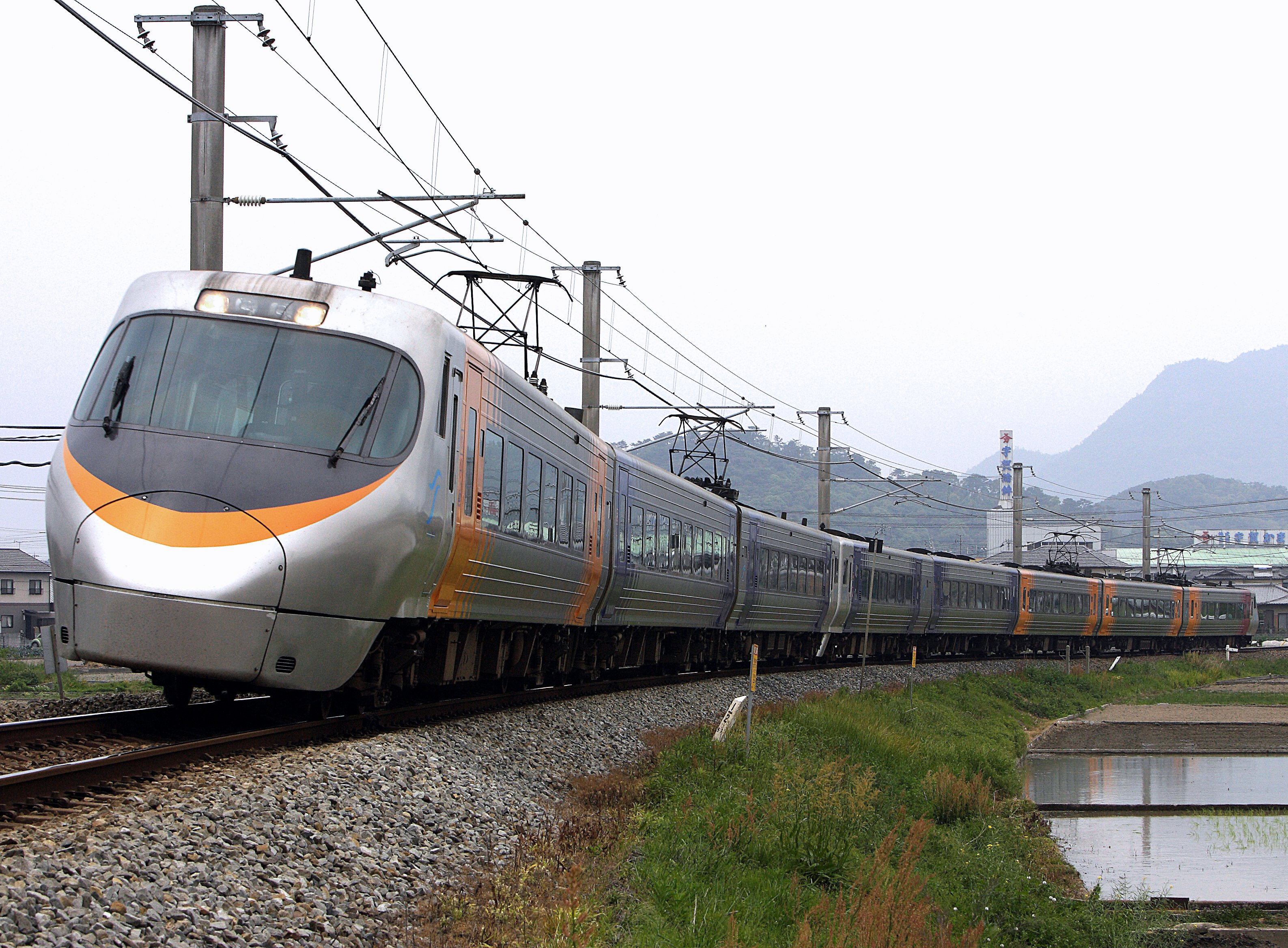 JR四国8000系電車 「しおかぜ」